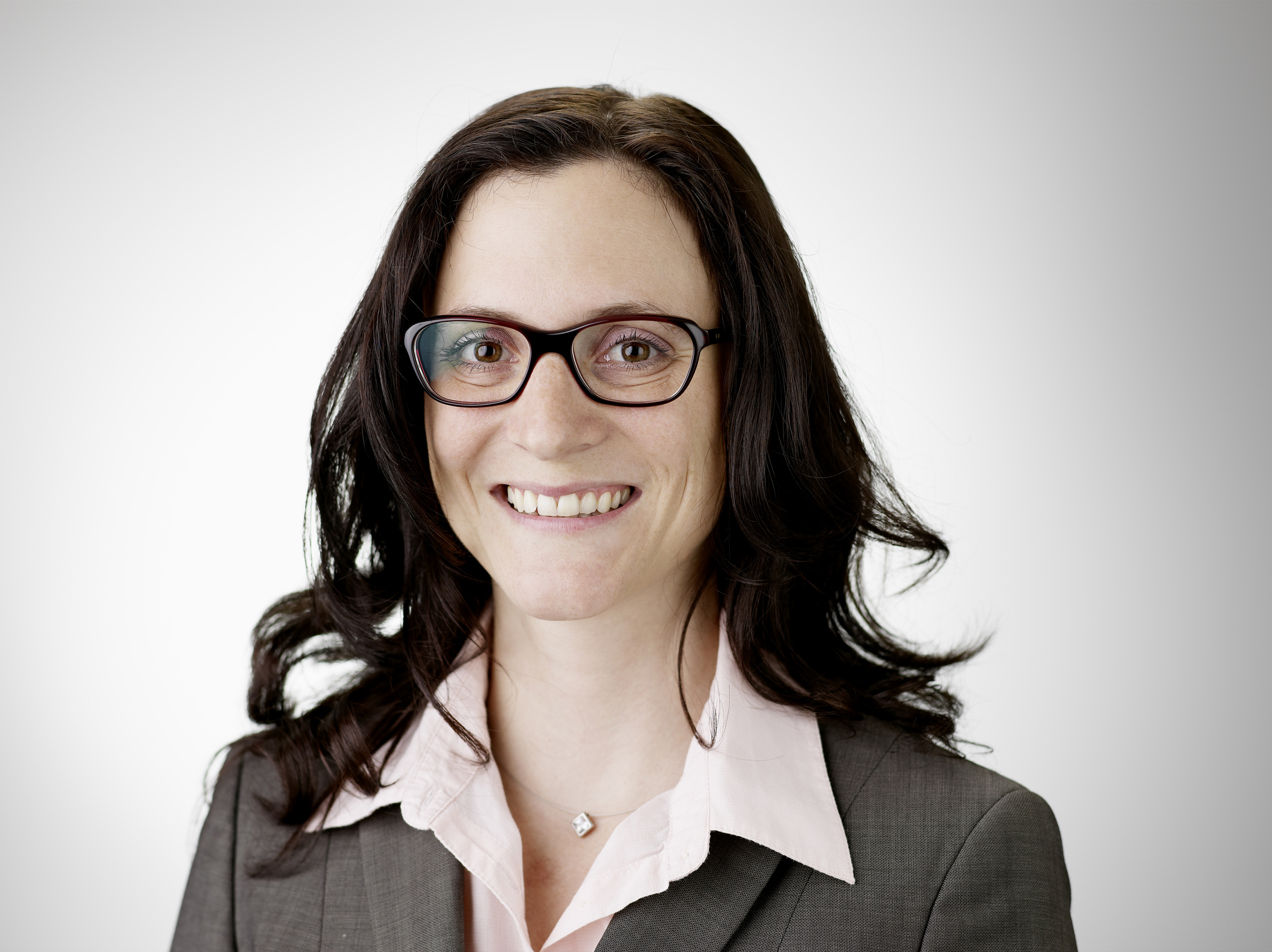 Yvonne Suter kandidiert an den nationalen Wahlen vom 23. Oktober 2011 als Kandidatin der CVP für die grosse Kammer.